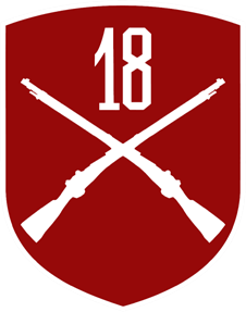 18 Dywizja Zmechanizowana – oznaka rozpoznawcza Dowództwa 18 DZ na mundur wyjściowy – 2019, Polska.